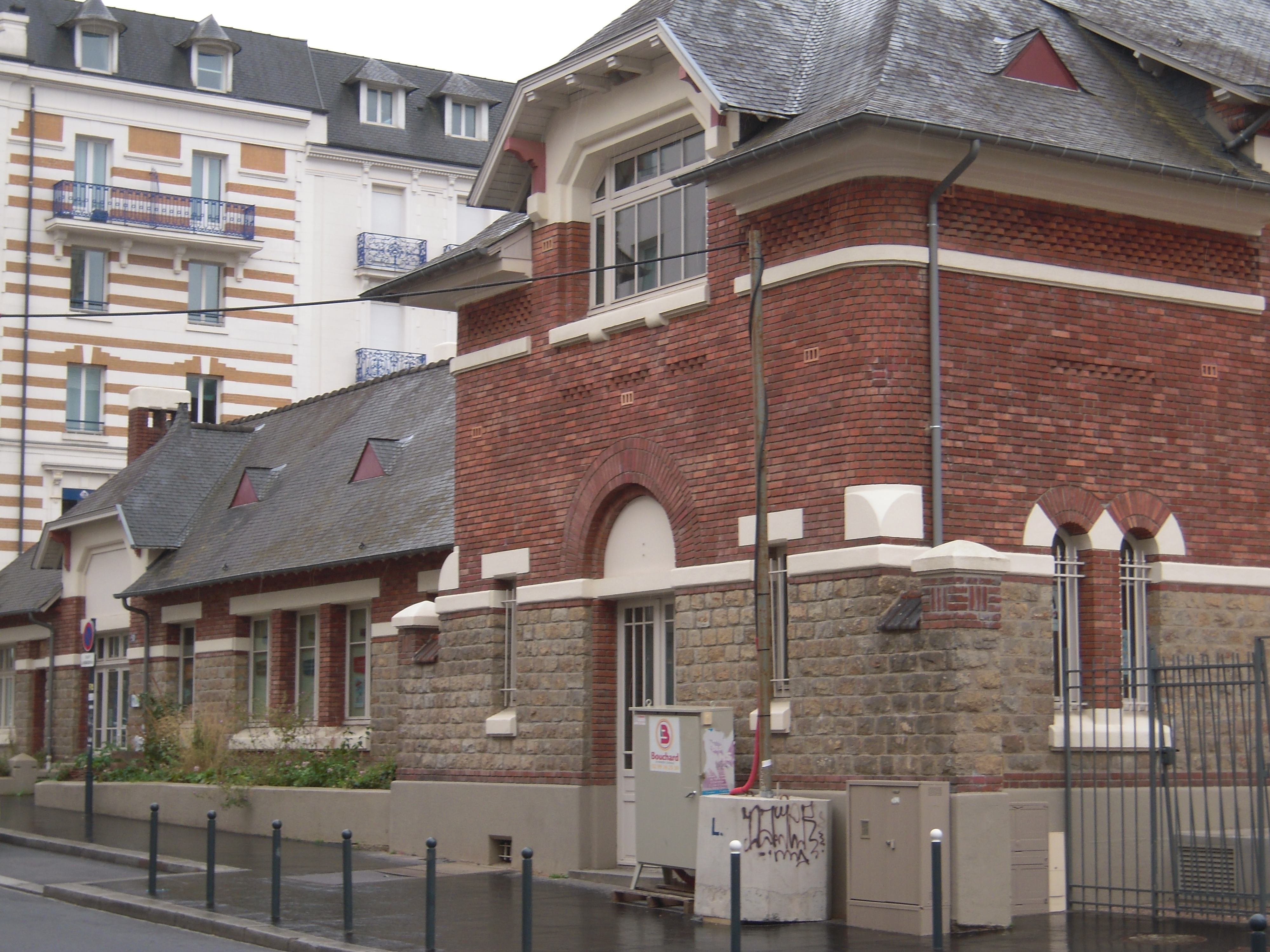 façade Ouest de la Mce à Rennes